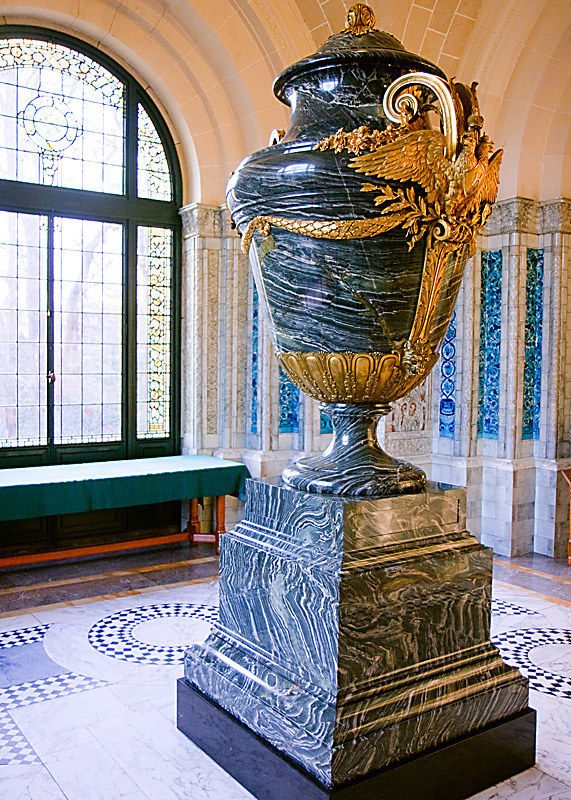 Vase d'un poids de 3 tonnes environ offert par la Russie au Palais de la Paix.